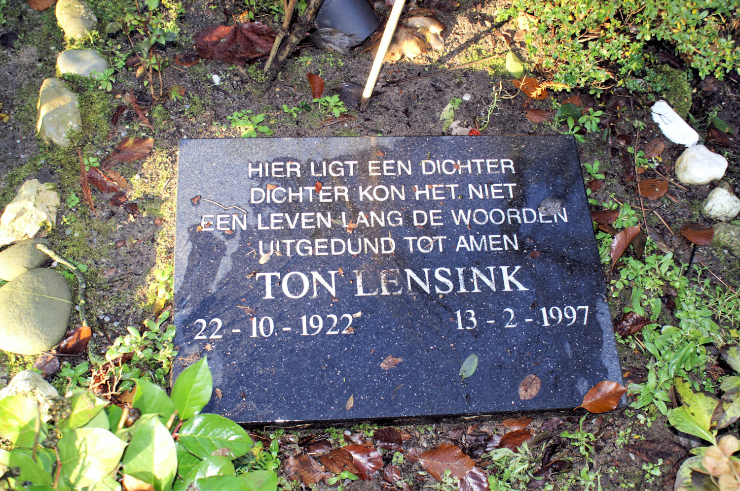 Foto van Han Fraijman Almere